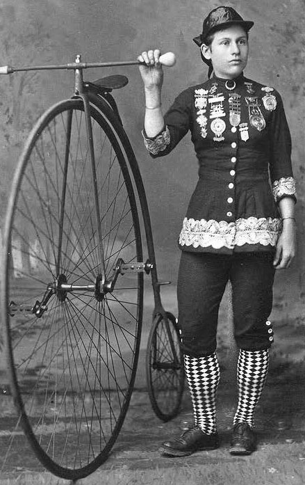 Louise Armando, canadian cyclist (1863-1900?)